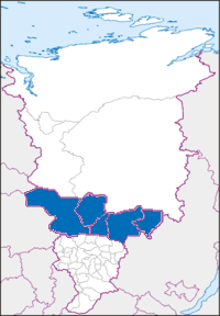 Мапа Доњег Приангарја (CarRadovan прилагодио)